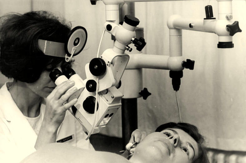 Rostock, Südstadt-Krankenhaus, Abteilung HNO Zentralbild Katscherowski 3.6.70 Rostock: Bezirkskrankenhaus- Eins der modernsten Krankenhäuser der DDR steht der Bevölkerung in Rostock-Südstadt zur Verfügung. Die Hals-Nasen-Ohren-Abteilung (unser Foto) ist eine der elf poliklinischen Abteilungen des Hauses für Erwachsene. Frau Dr. Gropp benutzt bei ihrer Untersuchung ein im VEB Carl Zeiss Jena hergestelltes Ohrmikroskop, das bei Diagnosen in der Ambulanz und bei Operationen verwendet wird. Das Rostocker Bezirkskrankenhaus, das 1965 zum Tag des Gesundheitswesens fertiggestellt wurde, besitzt rund 600 Betten, außer den Fachabteilungen für Erwachsene neun Kinder-Abteilungen und eine Kinderklinik. Unter der Leitung von Obermedizinalrat Prof. Dr. Michelsen arbeiten etwa 125 Ärzte, 450 Angehörige des medizinischen Personals und weitere 210 Mitarbeiter des Gesundheitswesens in diesem medizinischen Zentrum der Stadt Rostock und ihrer Umgebung. Im poliklinischen Teil können täglich bis zu 1 400 Personen ärztlichen Rat und Hilfe finden. Im stationären Bereich werden jährlich 14.000 Patienten behandelt. Neben mehreren Bettenstationen der verschiedenen Fachdisziplinen verfügt das Krankenhaus auch über eine große Bäder- und Massageabteilung, sowie über moderne technische Einrichtungen und Geräte in allen Abteilungen. Bitte beachten Sie zu dieser Serie die Fotos J 0603-08,09,10-1N